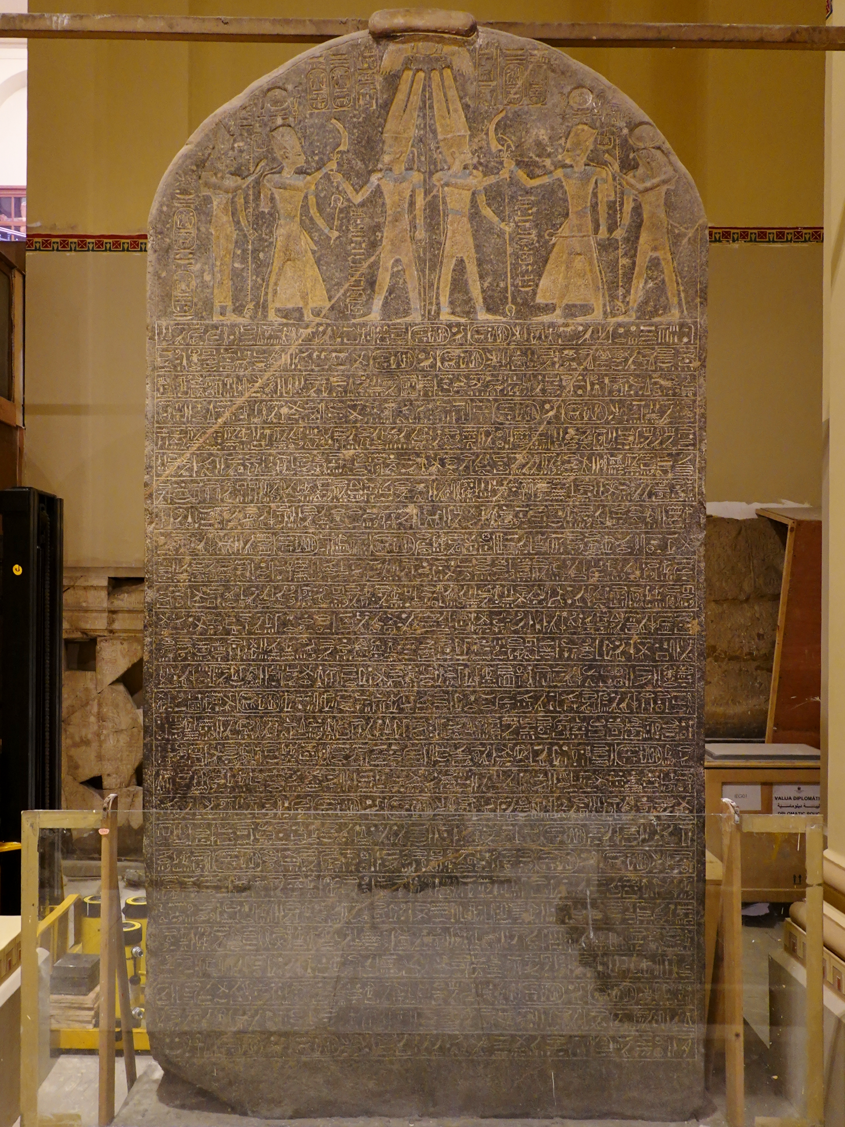 Siegesstele des Merenptah aus dem Totentempel des Königs der 19. Dynastie in Theben-West, ausgestellt im Ägyptischen Museum in Kairo, Ägypten